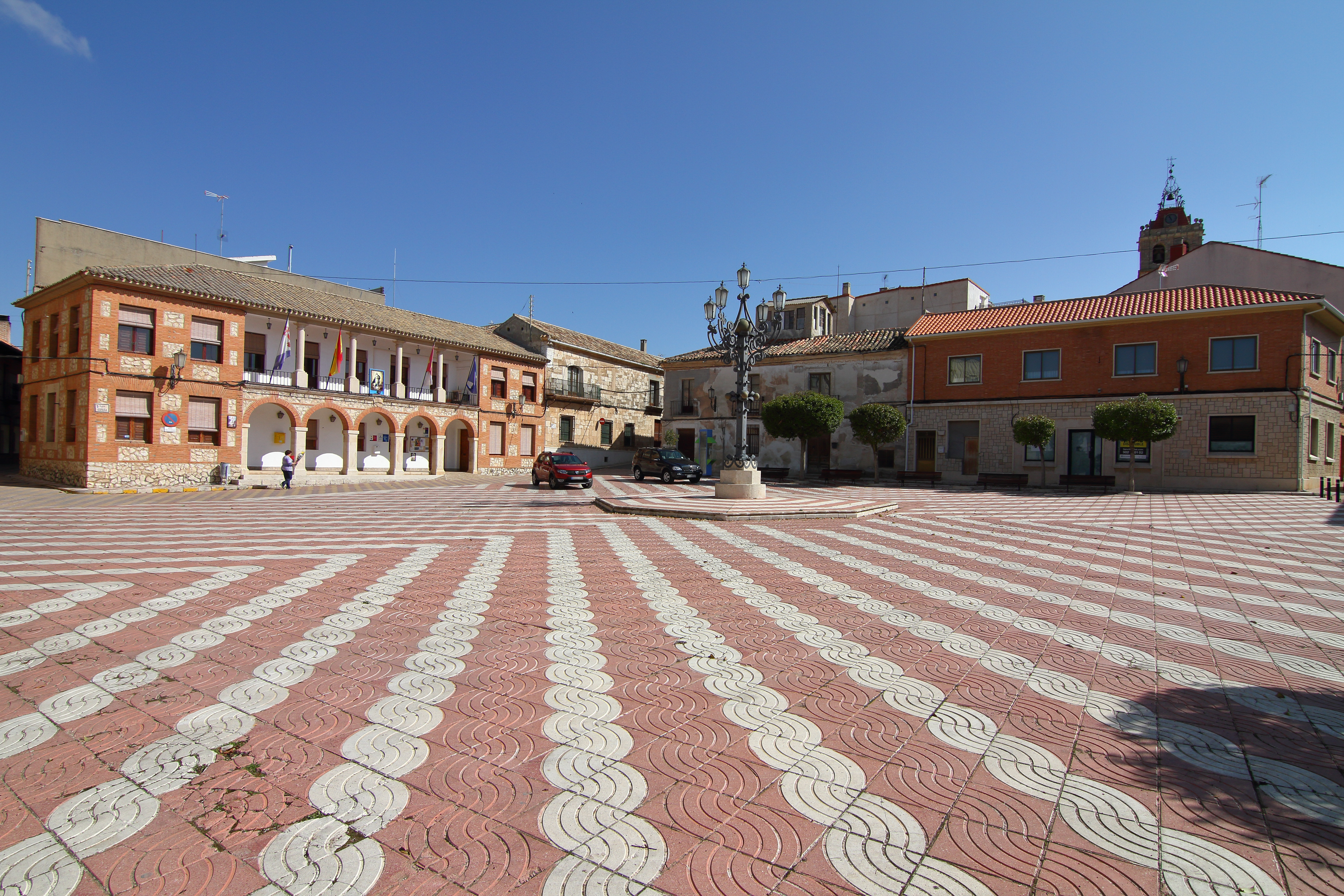 Horcajo de Santiago, Plaza de España